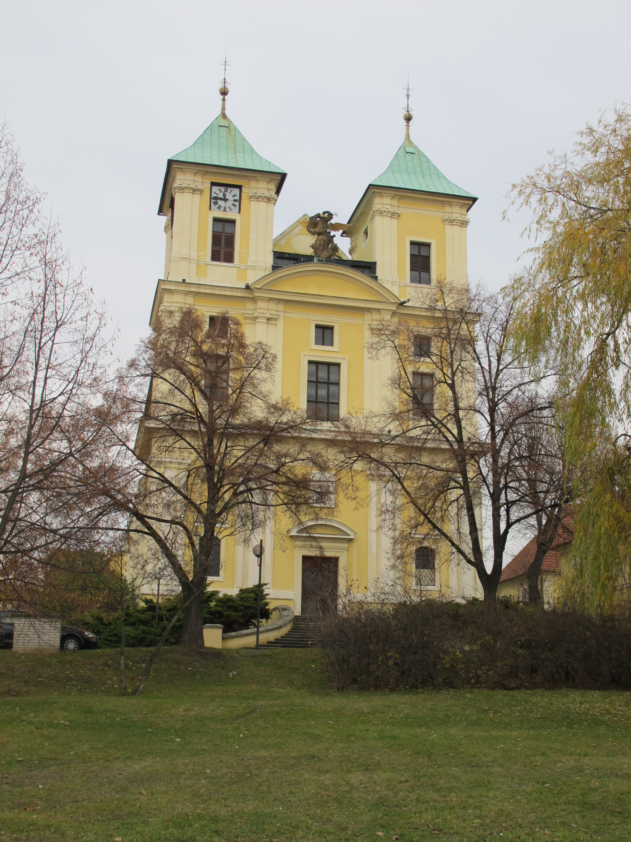 Kostel sv. Michaela archanděla, Masarykovo náměstí, Litvínov